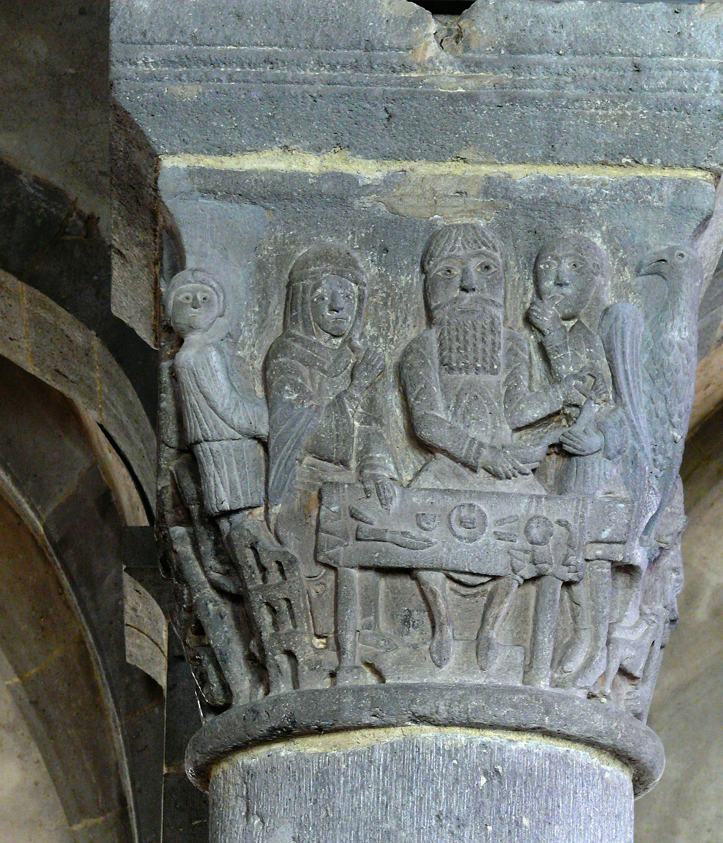 Besse-et-Saint-Anastaise - Eglise Saint-André - Chapiteau